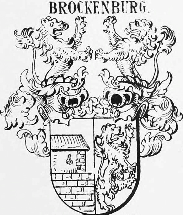 J. Siebmacher's grosses und allgemeines Wappenbuch, VI. Band, 12. Abteilung; Abgestorbener Adel der Sächsischen Herzogtümer; Verfasser: G.A. von Mülverstedt; Publikation: Nürnberg: Bauer & Raspe, 1907